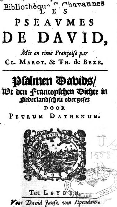 17de-eeuwse uitgave van de Psalmen Davids, vertaald door Petrus Dathenus naar Clément Marot & Théodore de Bèze, met Franse en Nederlandse teksten en melodische notatie.